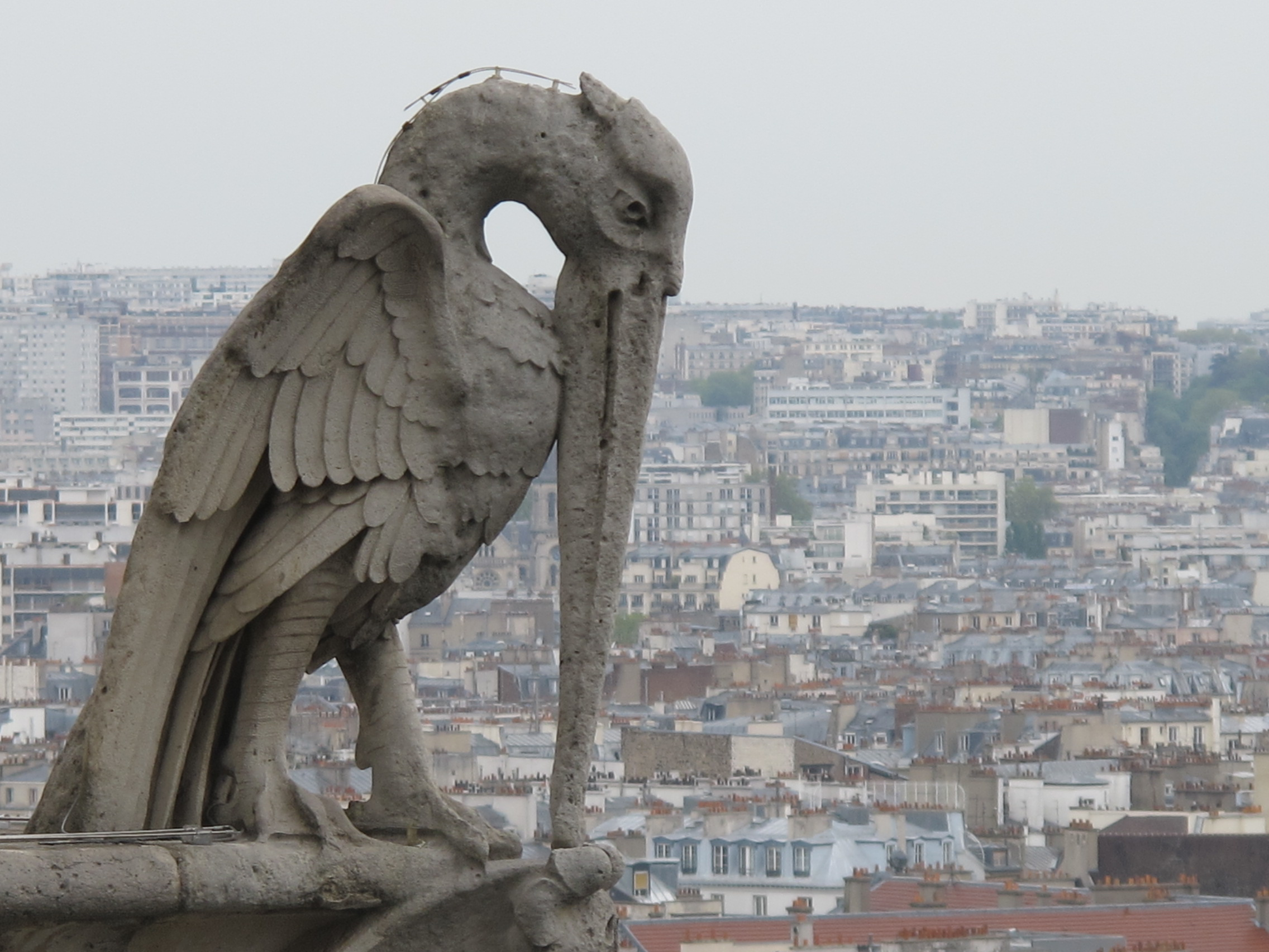 Les gargouilles de Notre dame de Paris